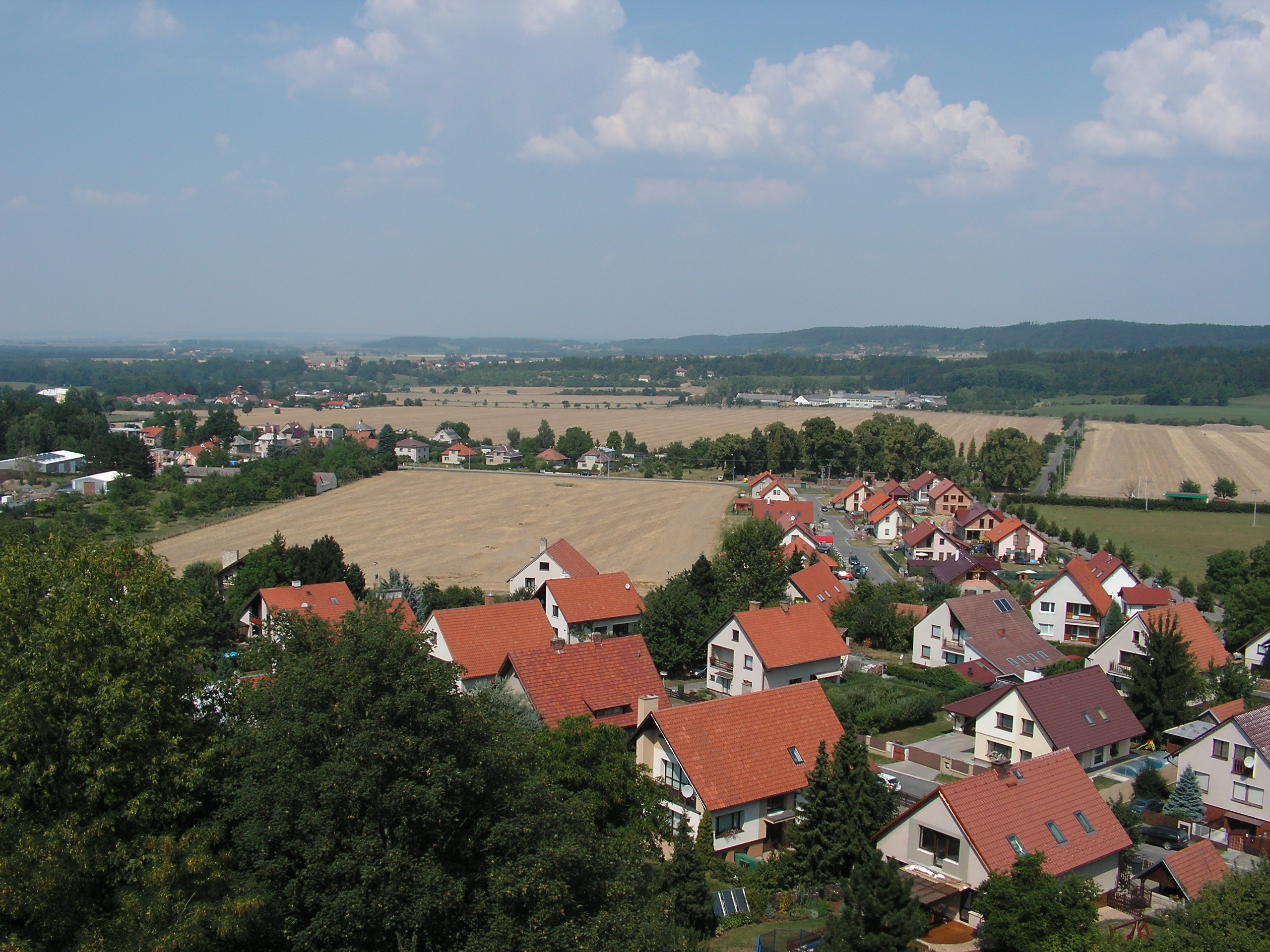 Pohled ze zříceniny hradu Košumberk